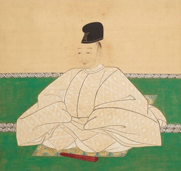 閑院宮美仁親王の肖像。